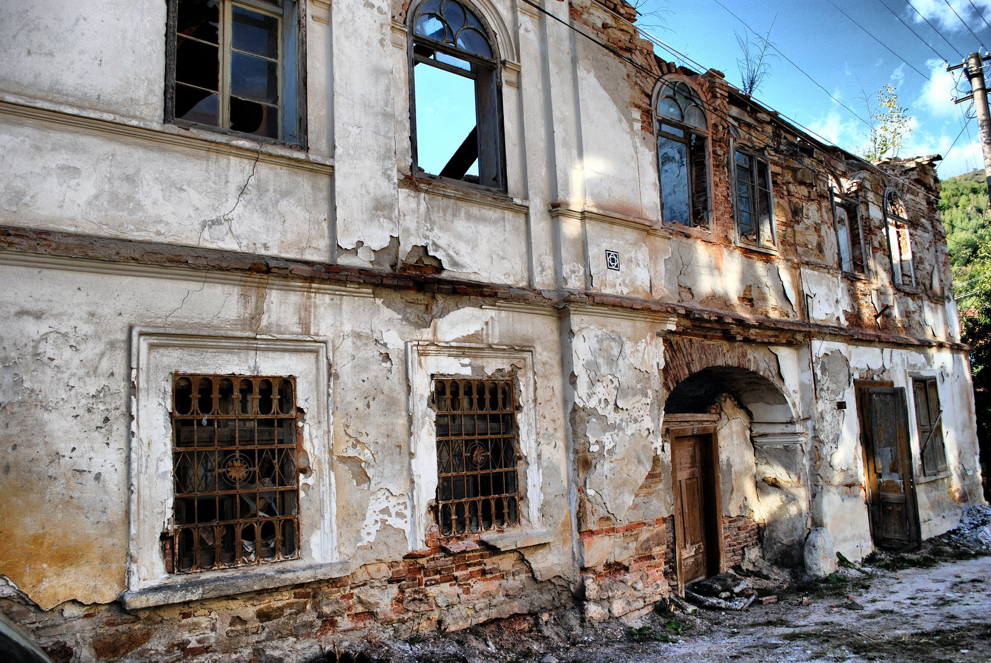 Casa parohială reformată, (faţada principală) - a fost construită la jumătatea secolului al XIXlea, ca oficiu parohial şi locuinţă, cu spaţii comerciale la parter, spre stradă. În perioada postbelică a funcţionat ca farmacie şi locuinţă de serviciu pentru farmacist. După 1990 spaţiul comercial a mai fost folosit ca magazin general şi magazin alimentar.